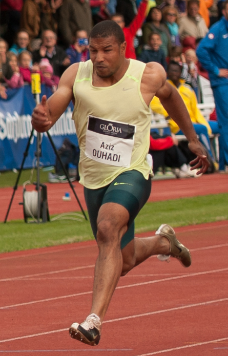 Salzburger Leichtathletik Gala am 27. Mai 2015: Aziz Ouhadi